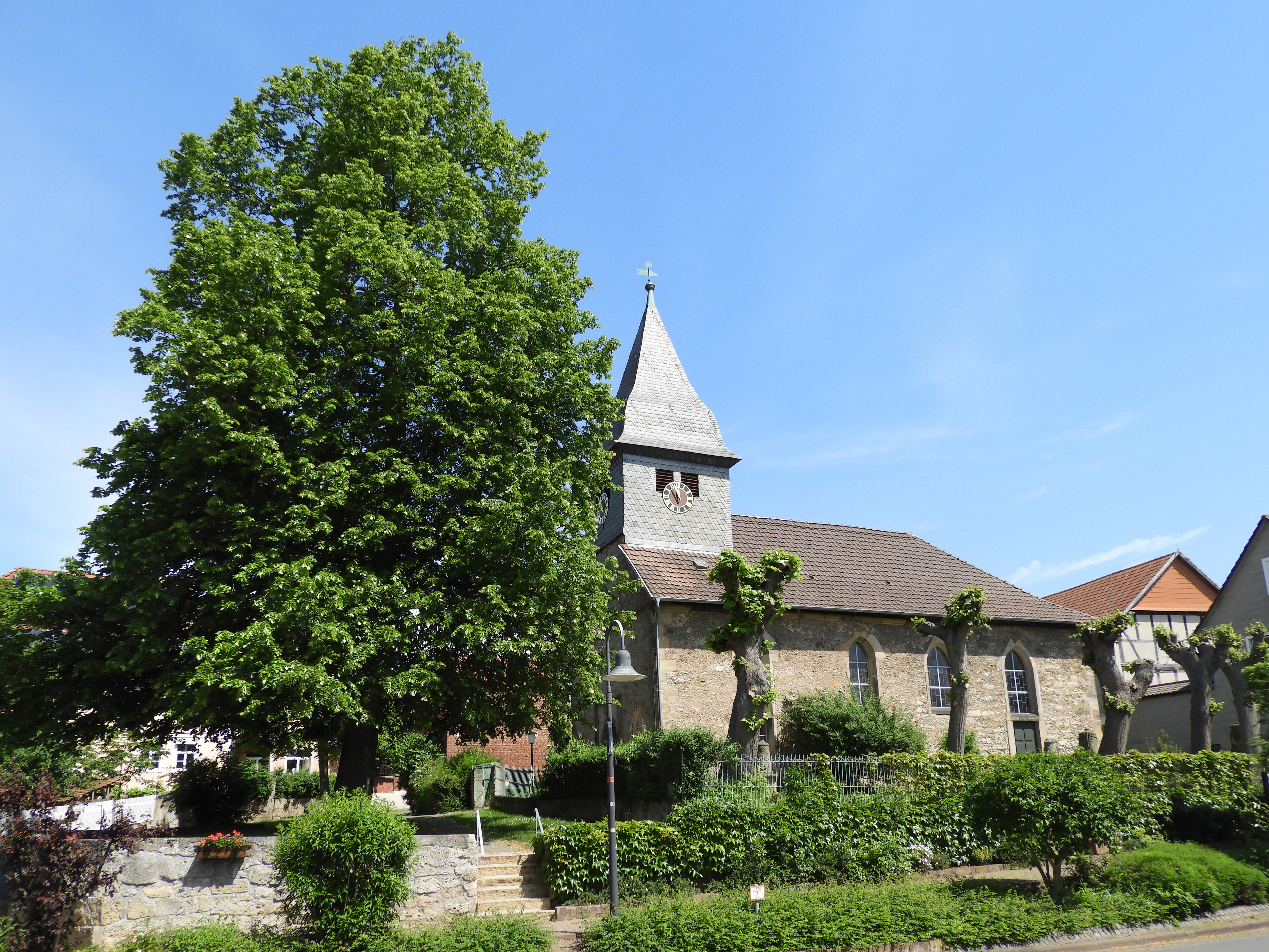 Die evangelische Pfarrkirche von Weidenhausen hat einen gotischen Westteil mit einem spätgotischem Westportal aus dem Jahr 1522. Um 1740 wurde die Kirche umgebaut und in 1743 ein Fachwerktürmchen aufgesetzt. Wegen ihrer künstlerischen, baulichen und geschichtlichen Bedeutung ist der Bereich ein geschütztes Kulturdenkmal. Der Anger vor dem Kirchhof ist ein ummauerter Platz. Auf der früheren Gerichtsstätte steht eine rund 100jährige Linde, die in 1936 zum Naturdenkmal erklärt wurde.